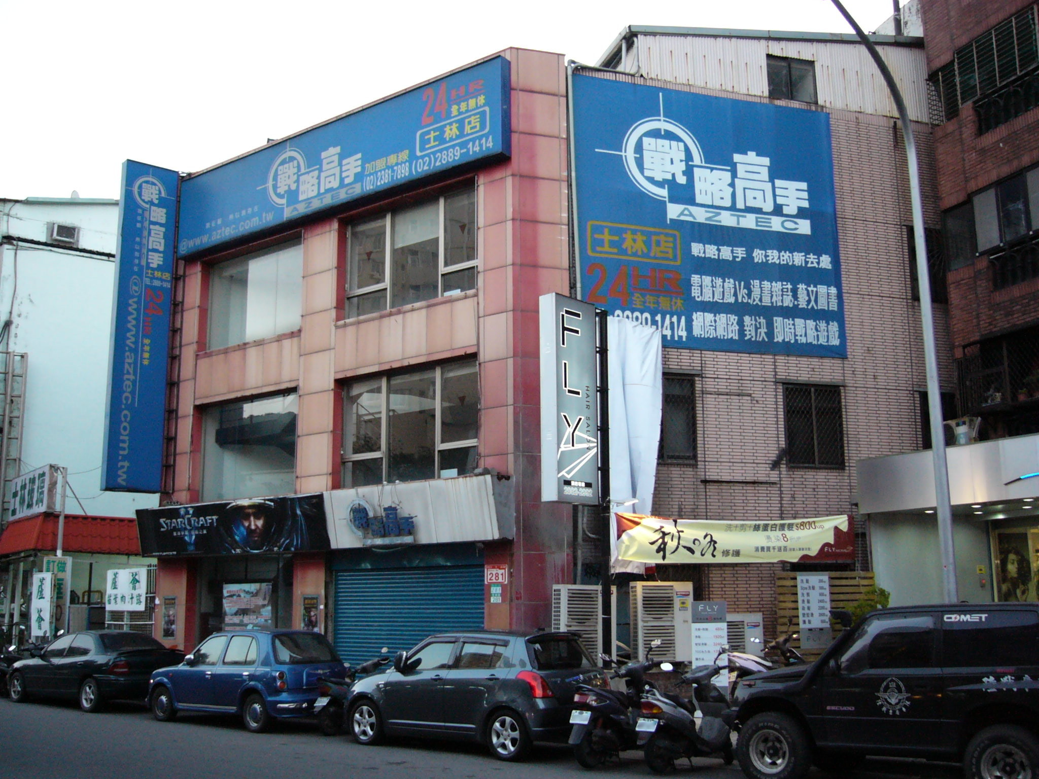 戰略高手士林店，位於臺北市士林區文林路281號，已歇業。